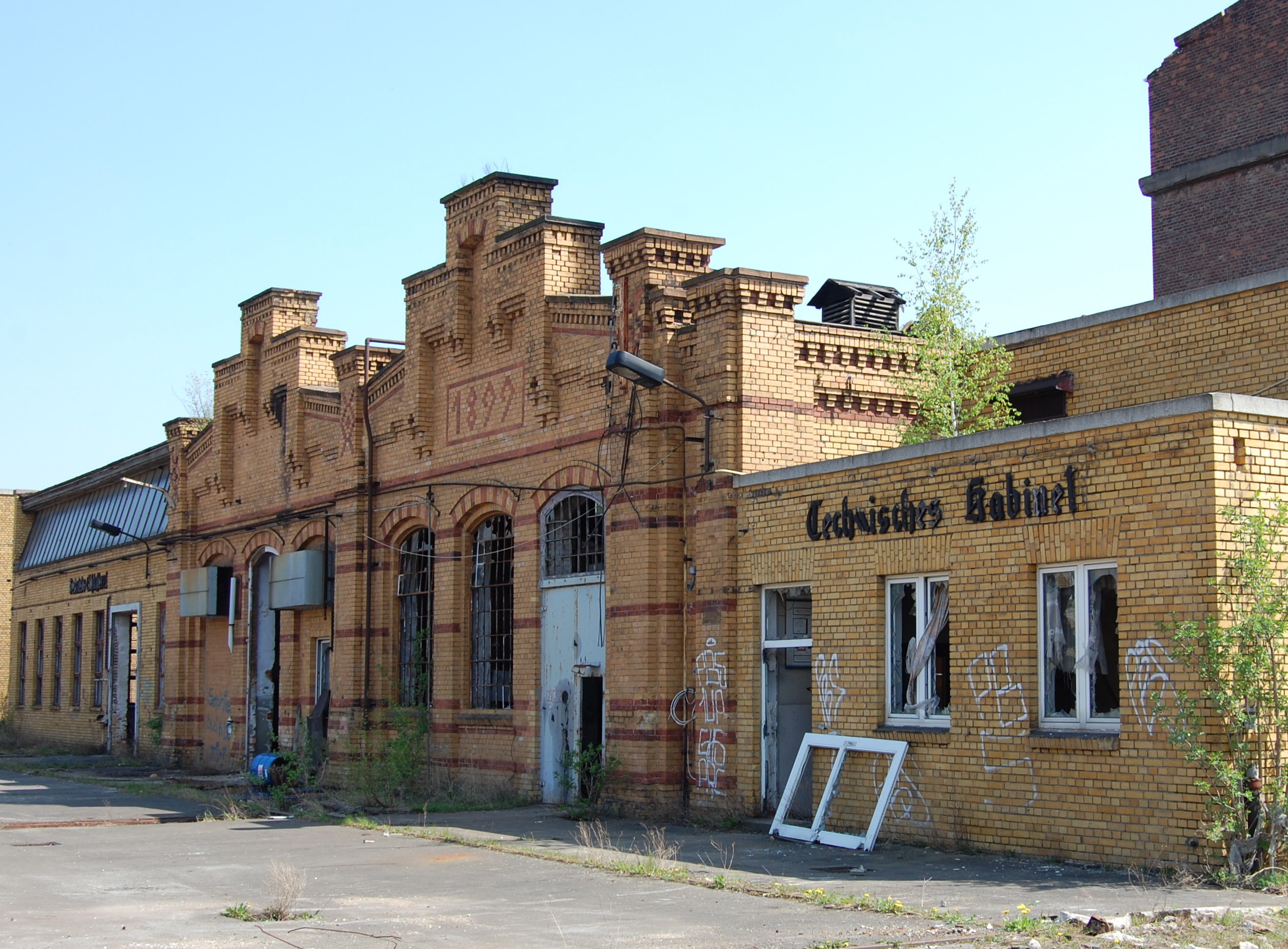 Nordfassade Kesselhaus des RAW Salbke, 1899